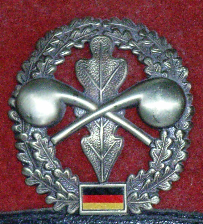 Barettabzeichen der ABC-Abwehrtruppe der Bundeswehr (zwei gekreuzte Retorten mit Eichenlaub). Ausgabedatum des Baretts 1986, des Abzeichens 1987.